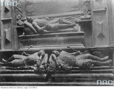 Nagrobek braci Mikołaja, Aleksandra i Prokopa Sieniawskich w kaplicy Sieniawskich, w kościele zamkowym w Brzeżanach. Został wyrzeźbiony w latach 1636-1641 przez Jana Pfistera. Obecnie zdewastowany.